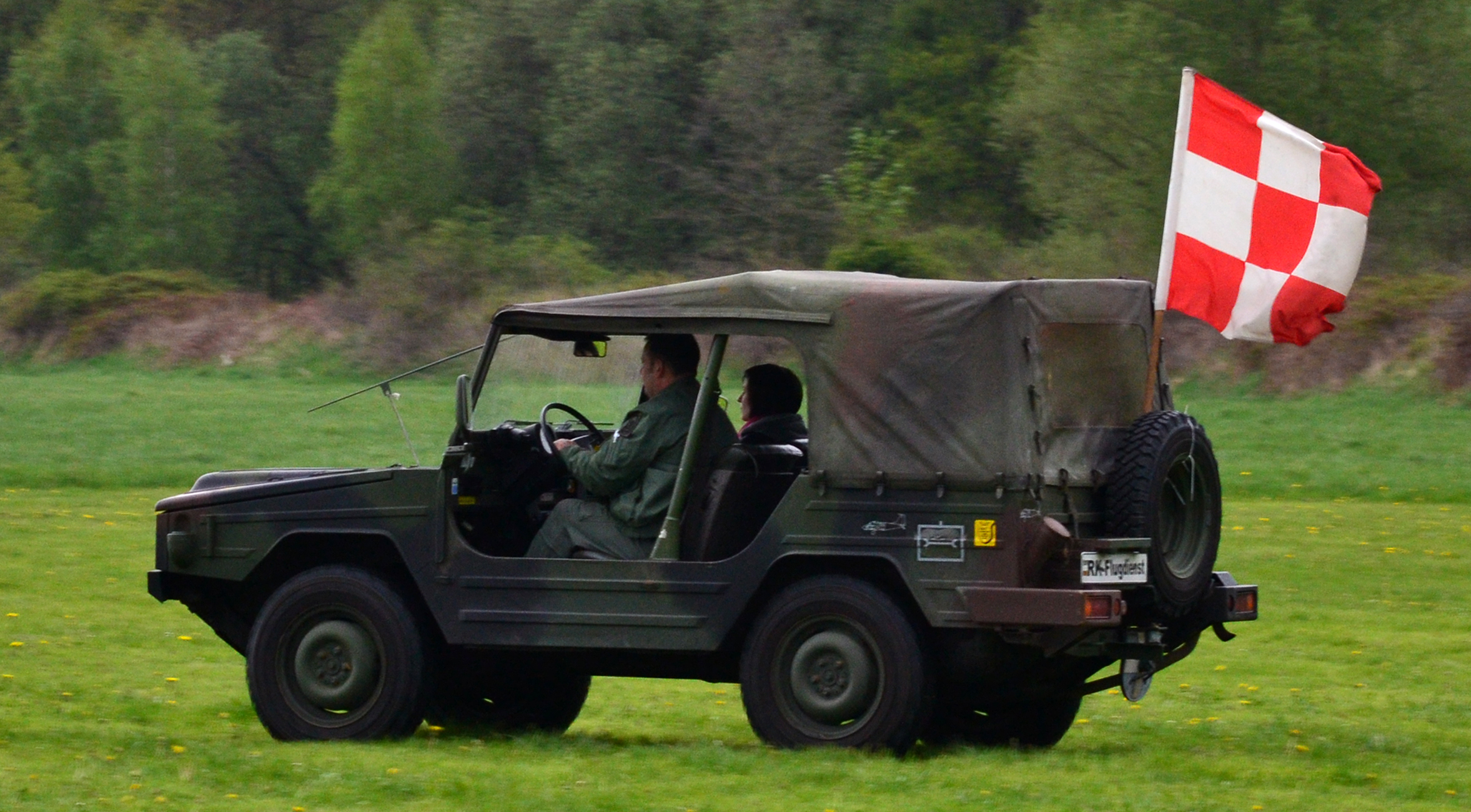 VW Iltis des RK-Flugdienst auf dem Flugplatz Uetersen